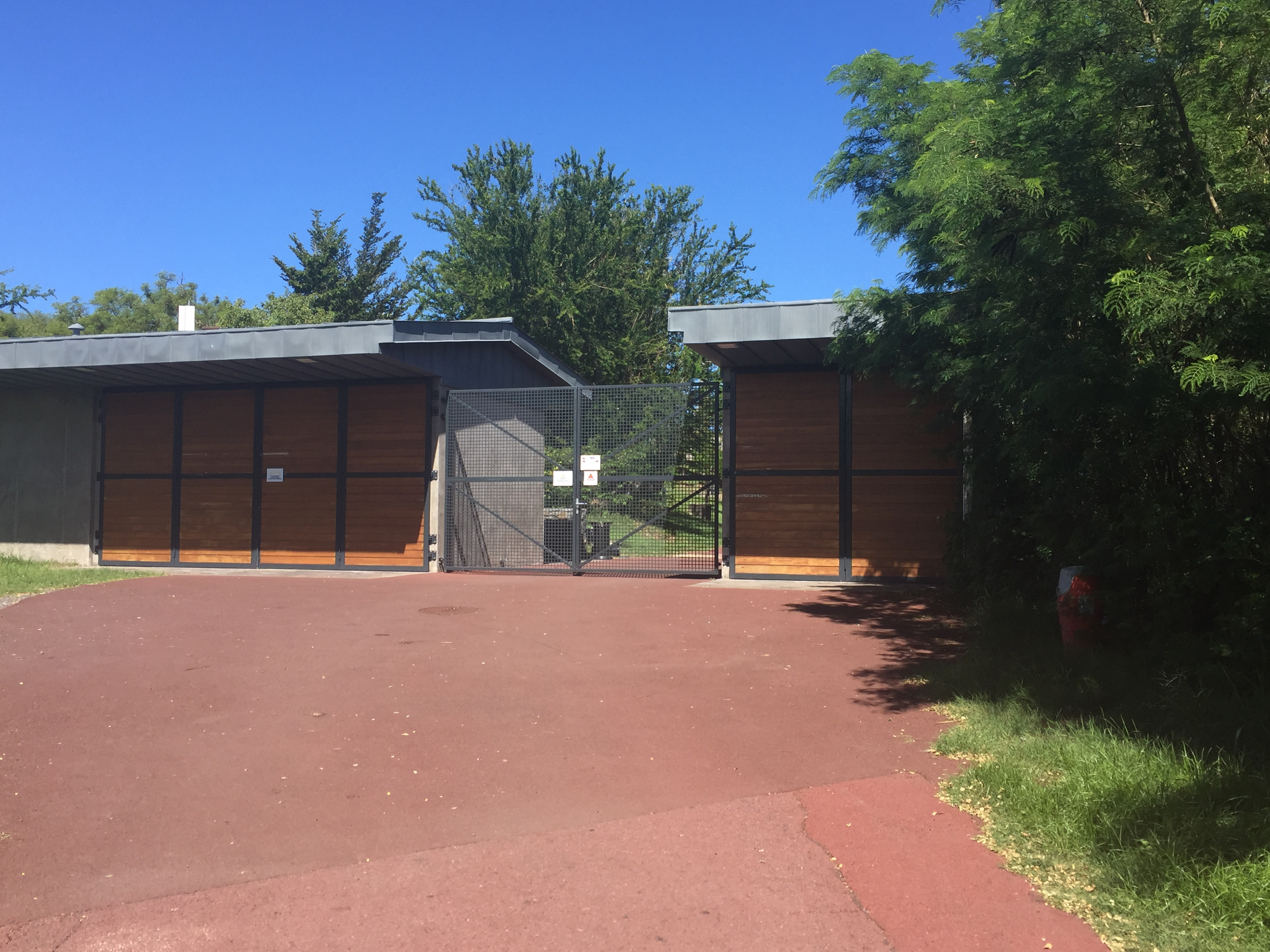 Billetterie du site, le 11 Mars 2018